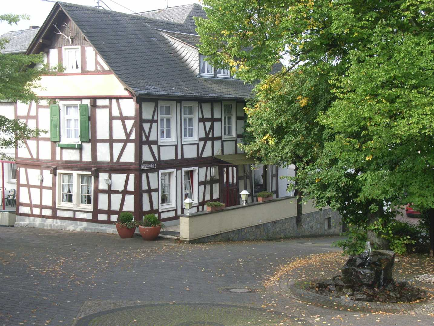 Gasthof „Krug zum grünen Kranze“, Ehlscheid, Landkreis Neuwied